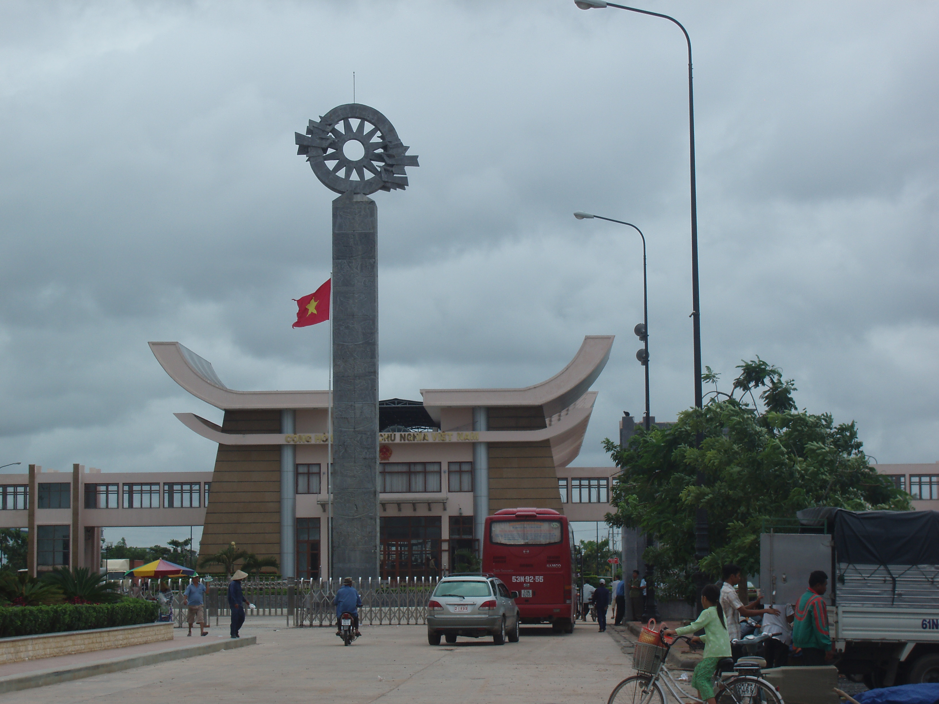 Moc Bai Border